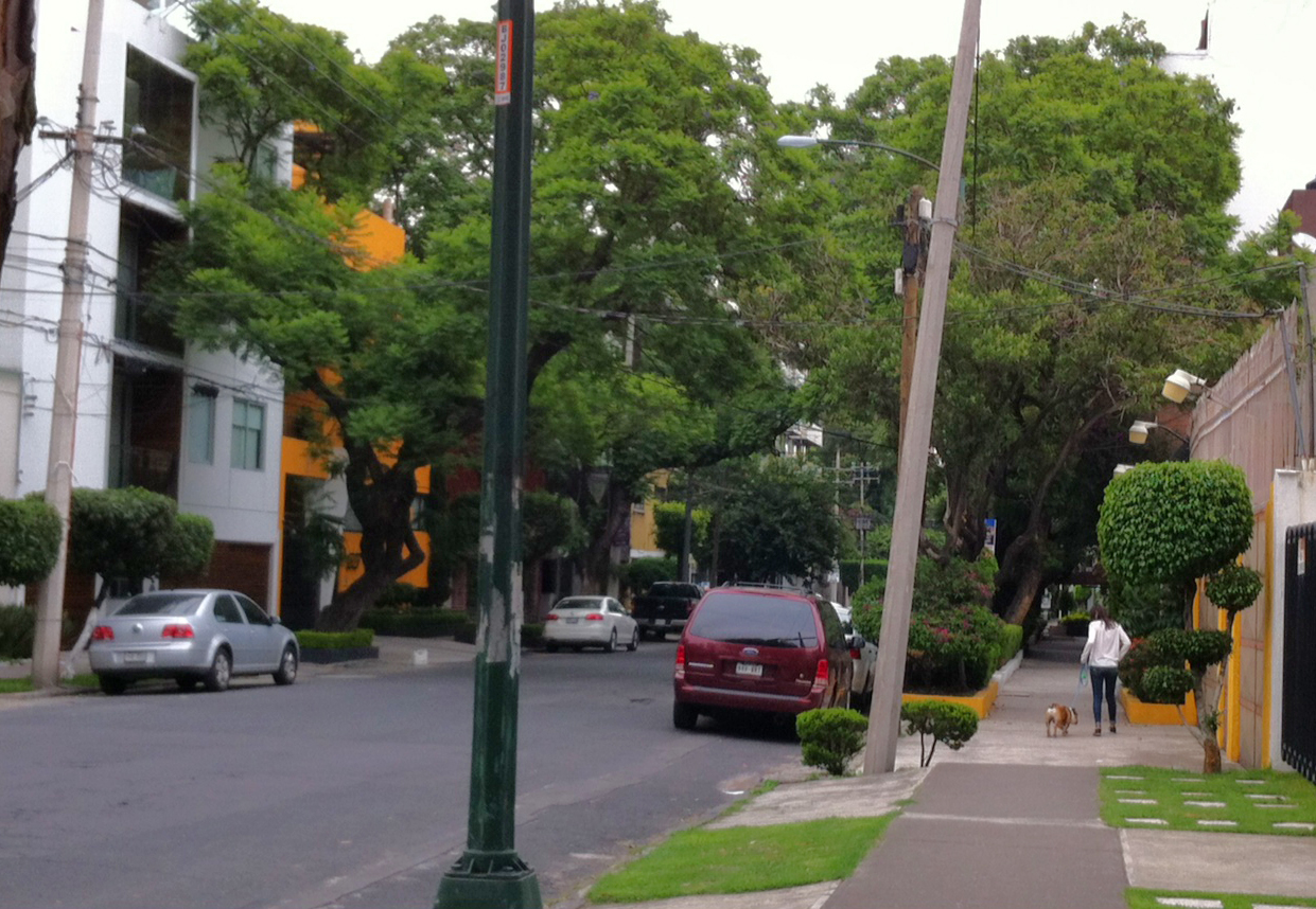 Vida Urbana en la Colonia Del Valle, 2015